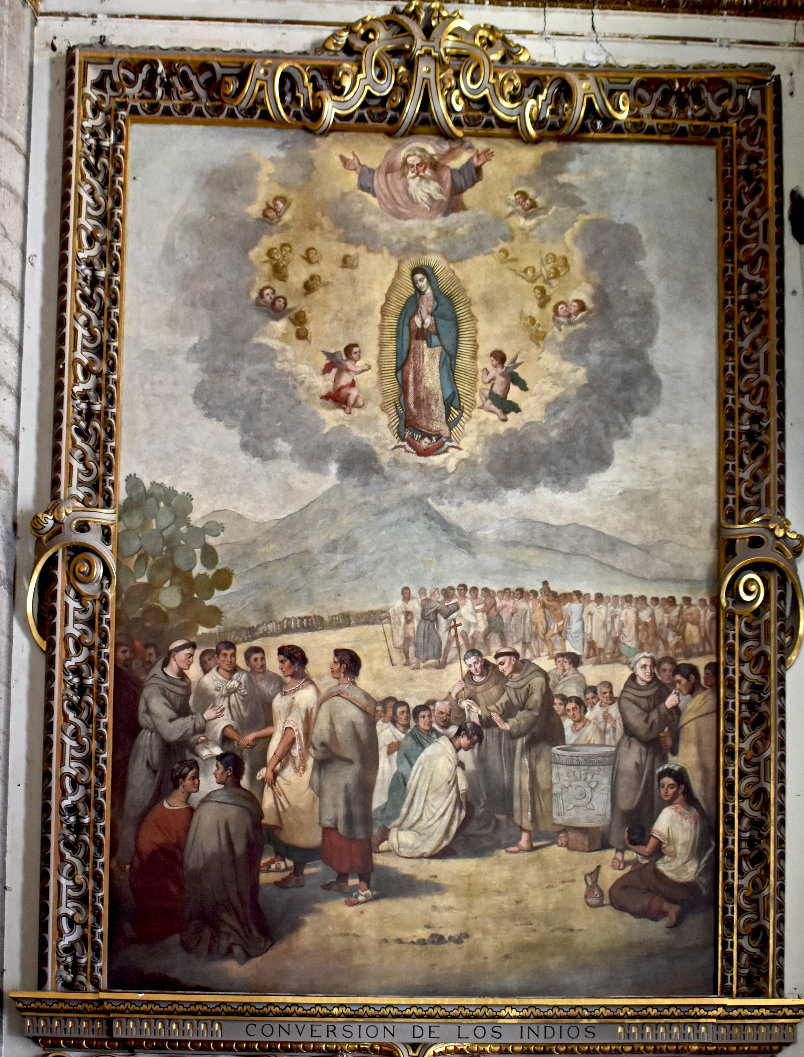 Pintura titulada "Conversión de los indios". Autor Felipe Gutiérrez, 1894. Óleo sobre tela, 5.20 x 8.00 m. Interior de la Antigua Basílica de Guadalupe. Conjunto Villa de Guadalupe